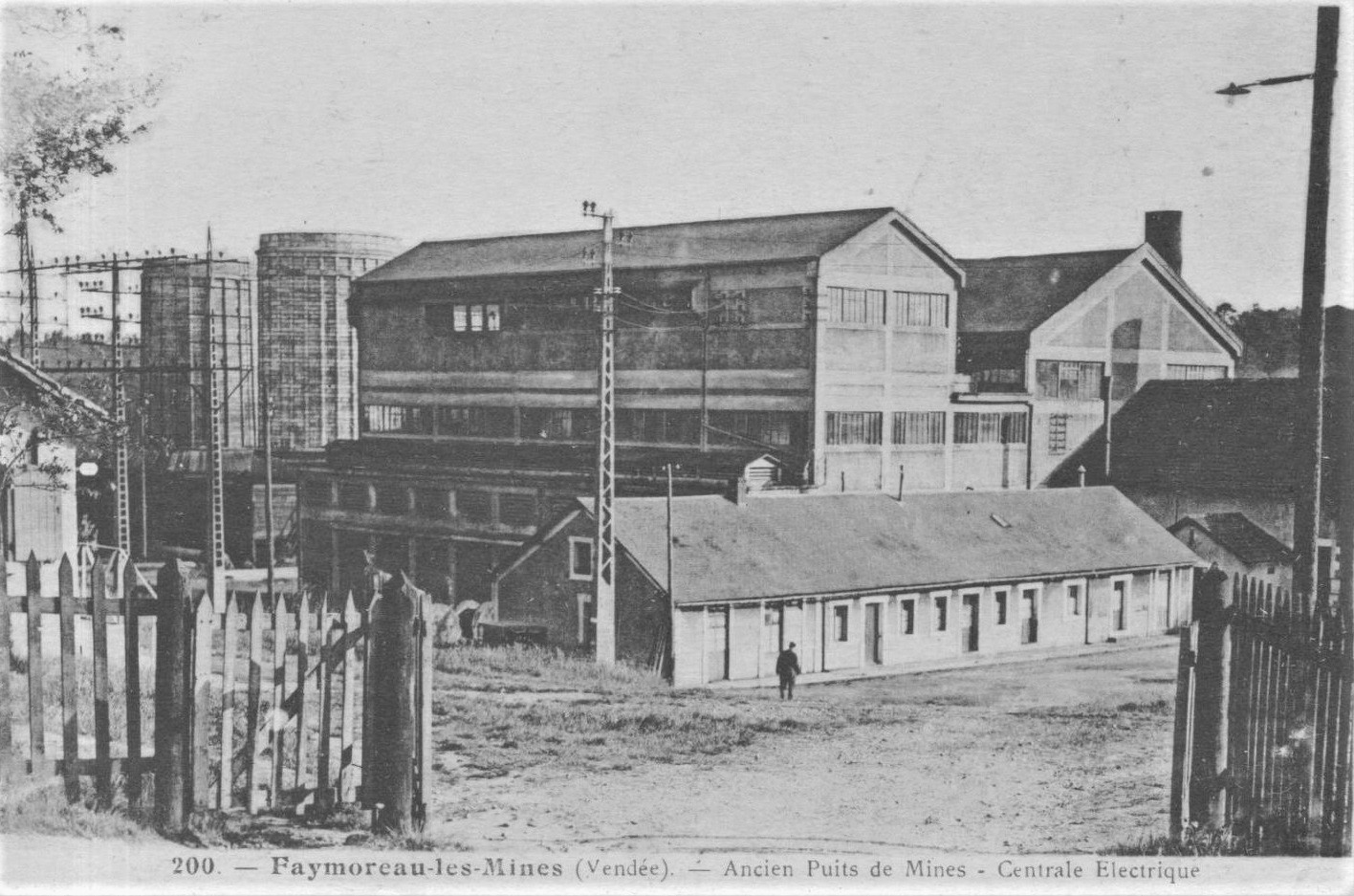 Puits du bassin houiller de Faymoreau (Vendée, France).